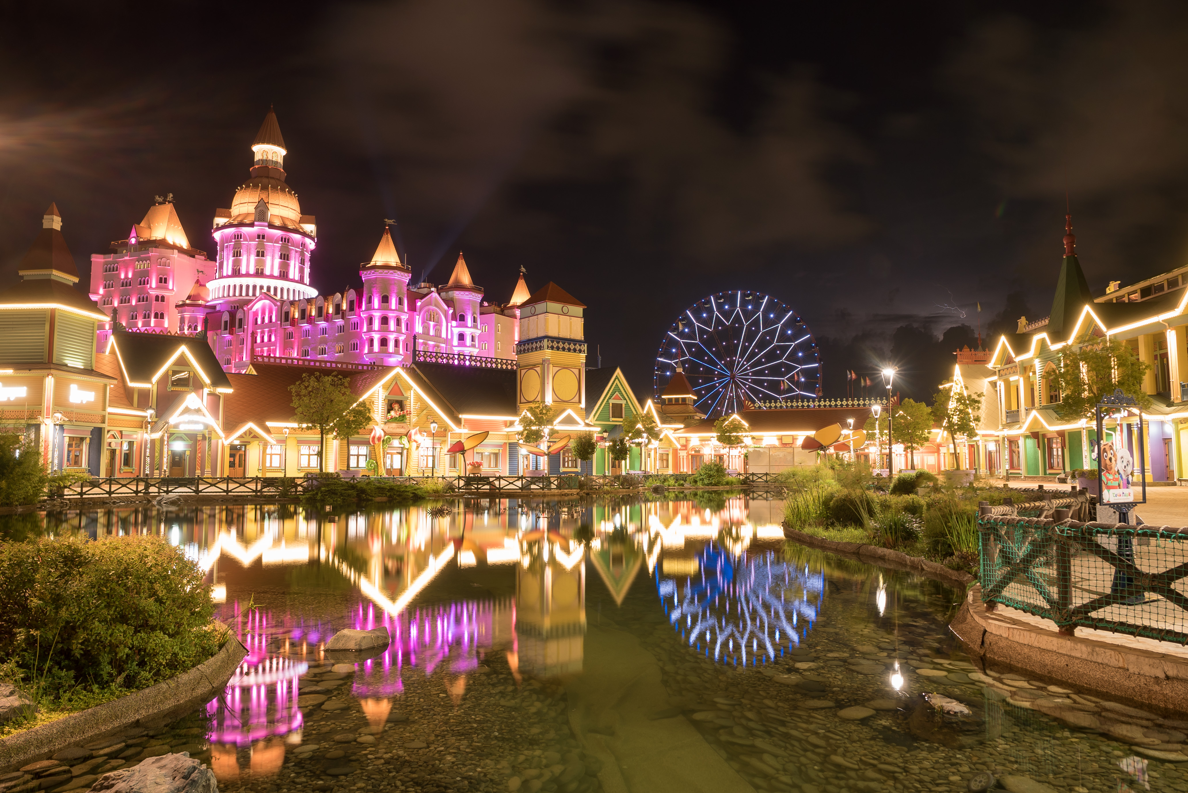 Сочи Парк Молния